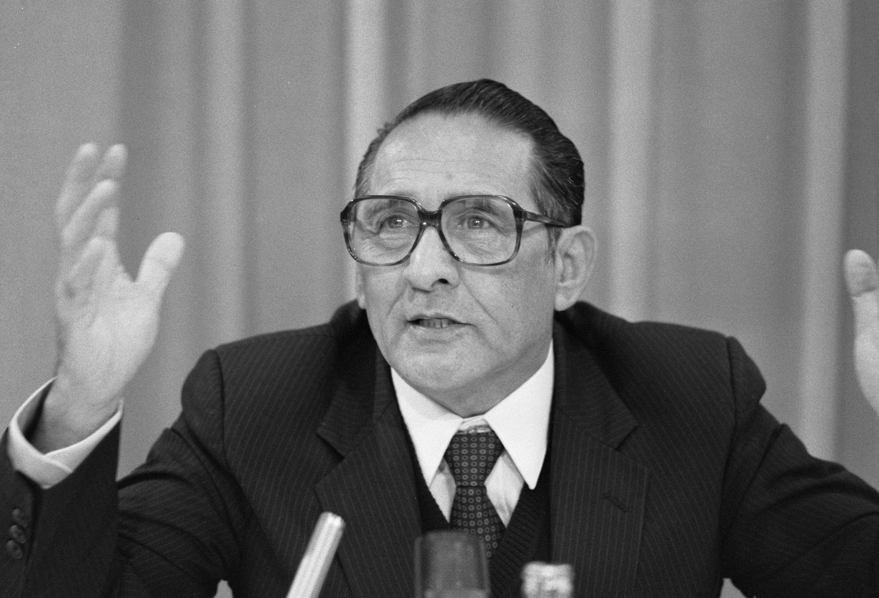 Persconferentie president Duarte , kop